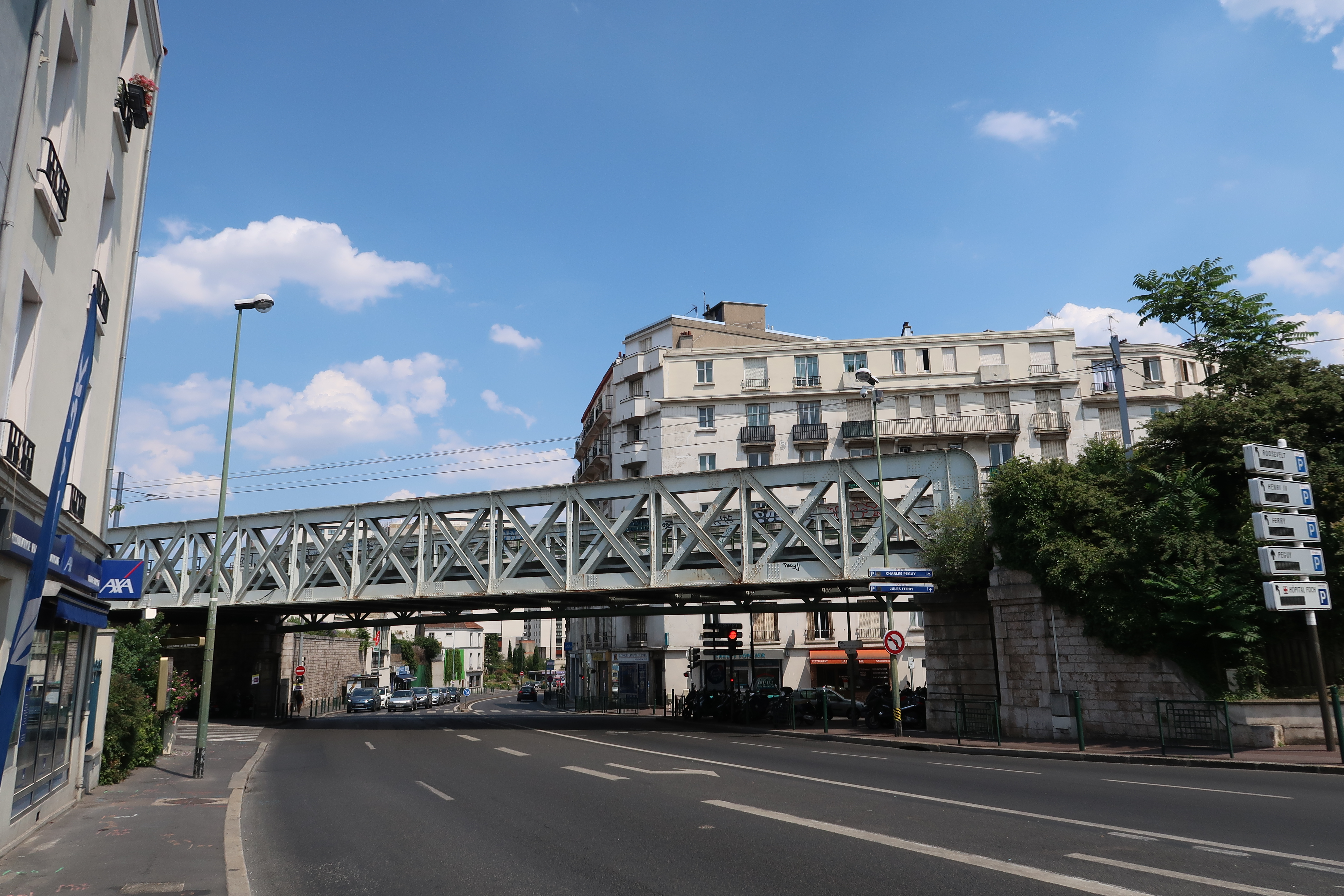 Pont ferroviaire sur le boulevard Henri-Sellier à Suresnes (Hauts-de-Seine).